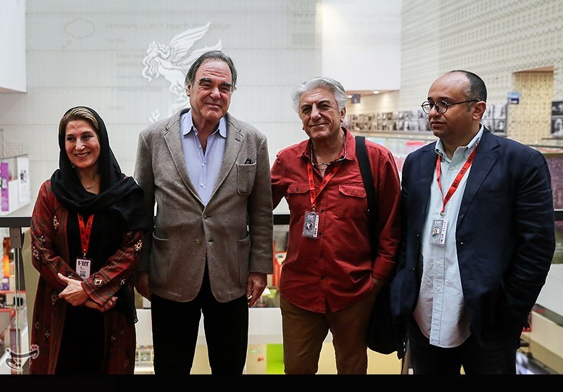 حضور الیور استون در جشنواره جهانی فیلم فجر